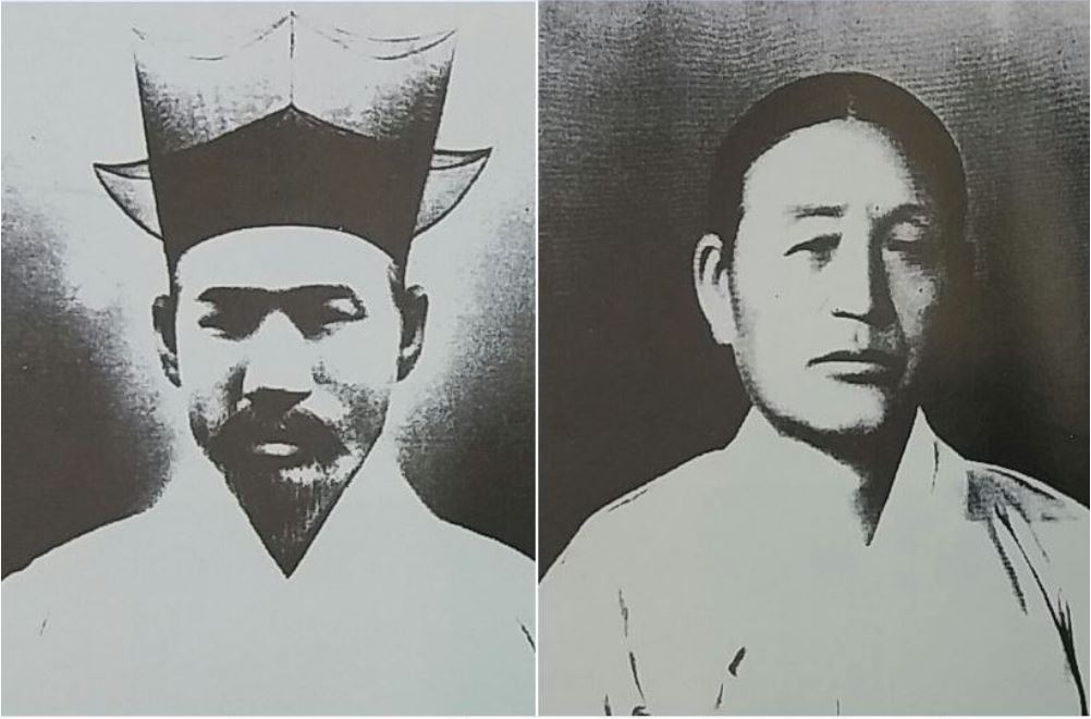 An Jung-geun's Parents